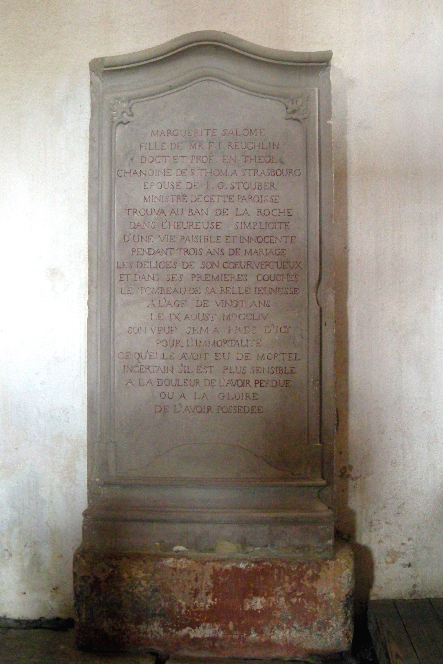 Pierre tombale de Marguerite Salomé, épouse du pasteur Stouber dans l'église de Waldersbach (Bas-rhin)